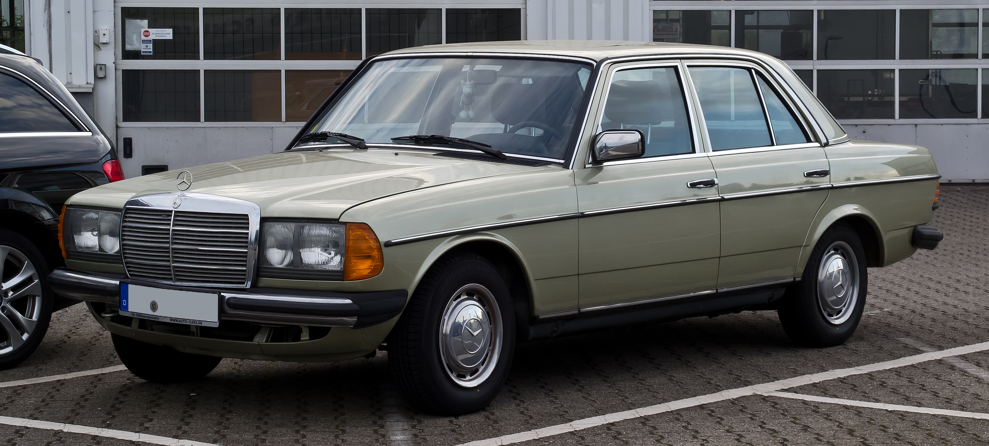 Mercedes-Benz 240 D (W 123, Facelift)